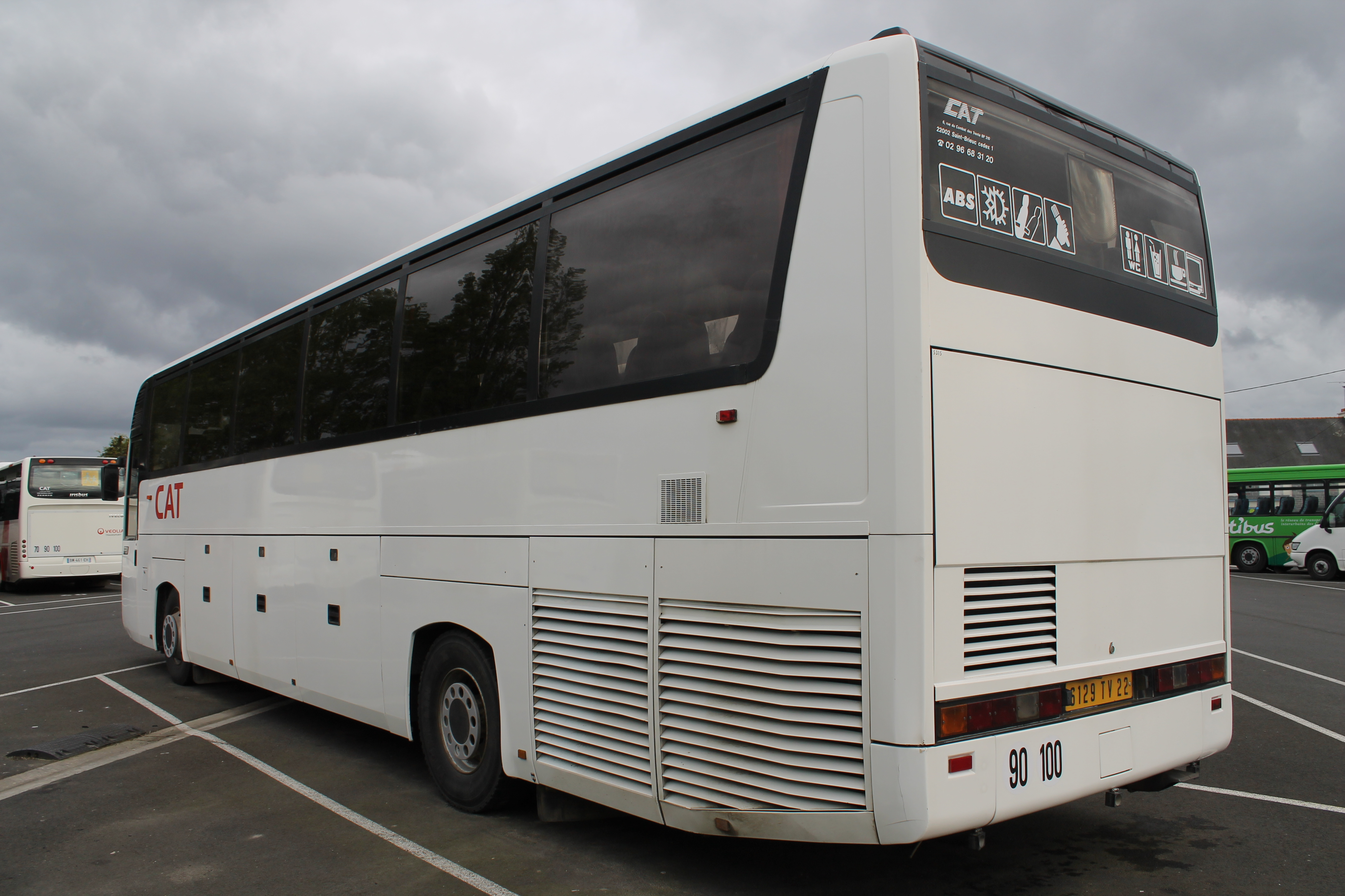 Renault FR1 - arrière